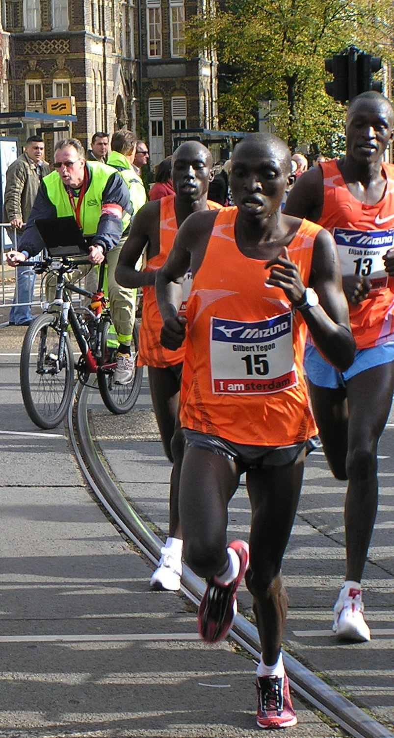 Kopgroep, even voorbij de 35 km. Nr. 15 is de uiteindelijke winnaar Gilbert Yegon, nr. 13 de nummer twee, Elijah Keitany.